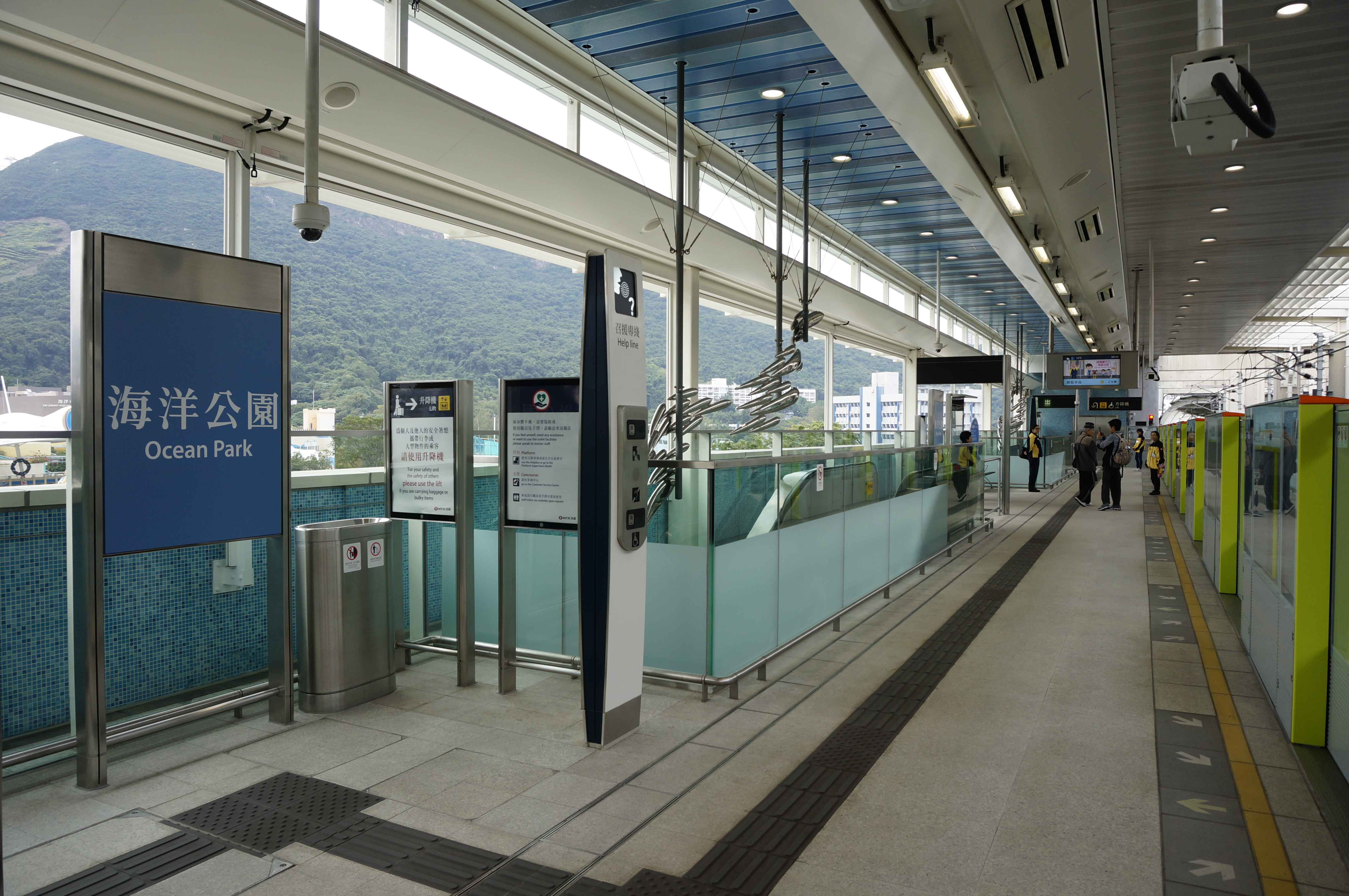 港鐵海洋公園站